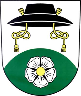 Znak obce Vysoké Popovice